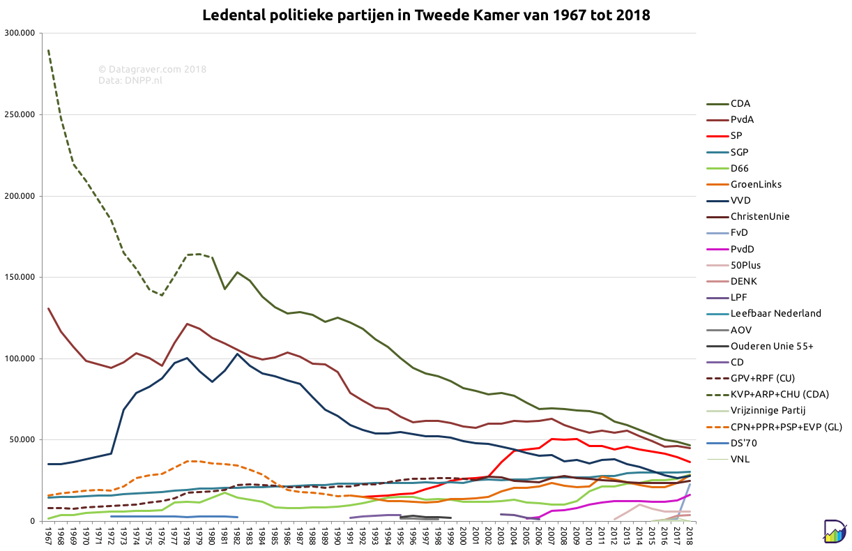 Ledental politieke partijen in de Tweede Kamer van 1967 tot 2018 Data